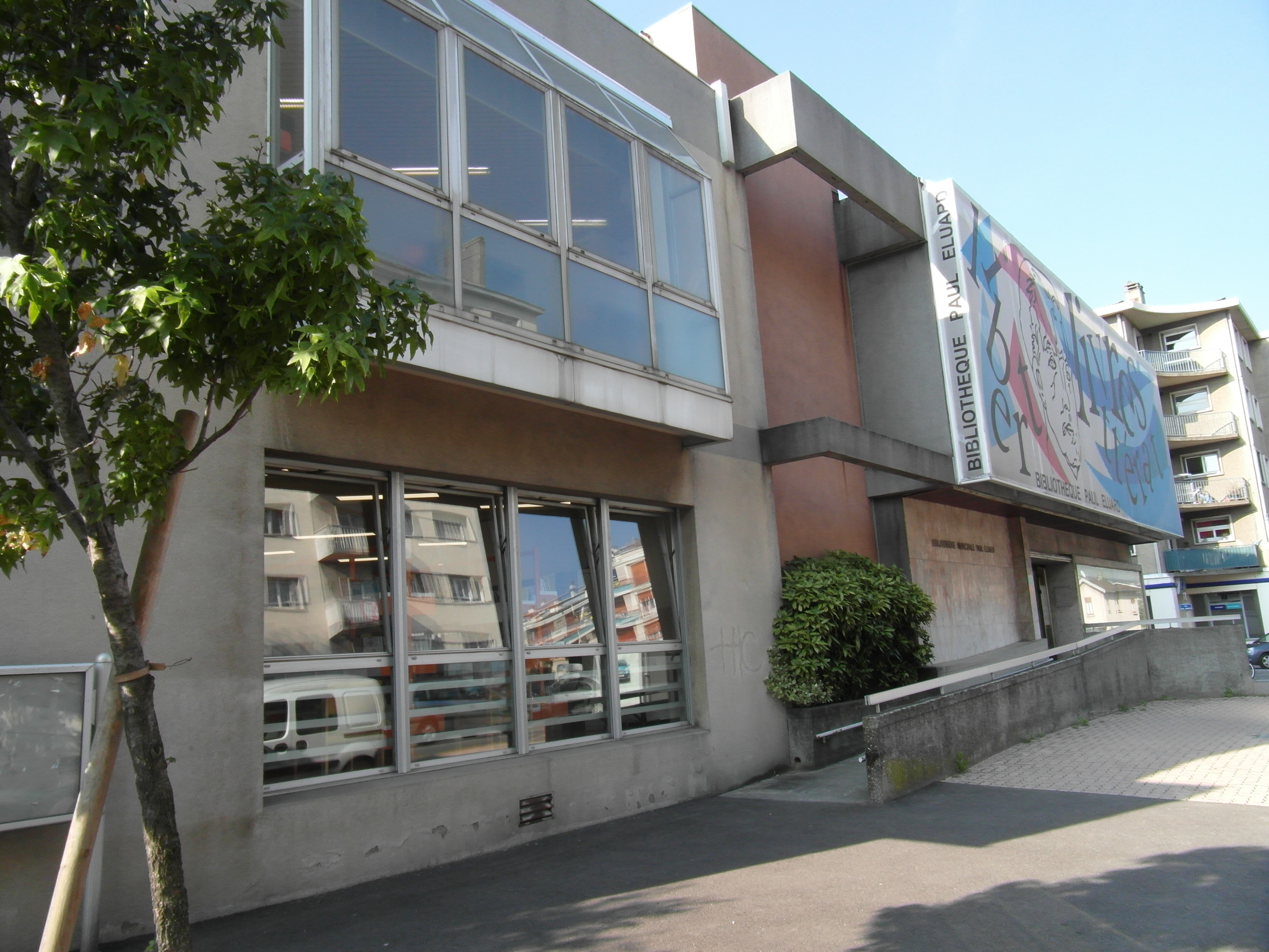 Bibliothèque de Fontaine